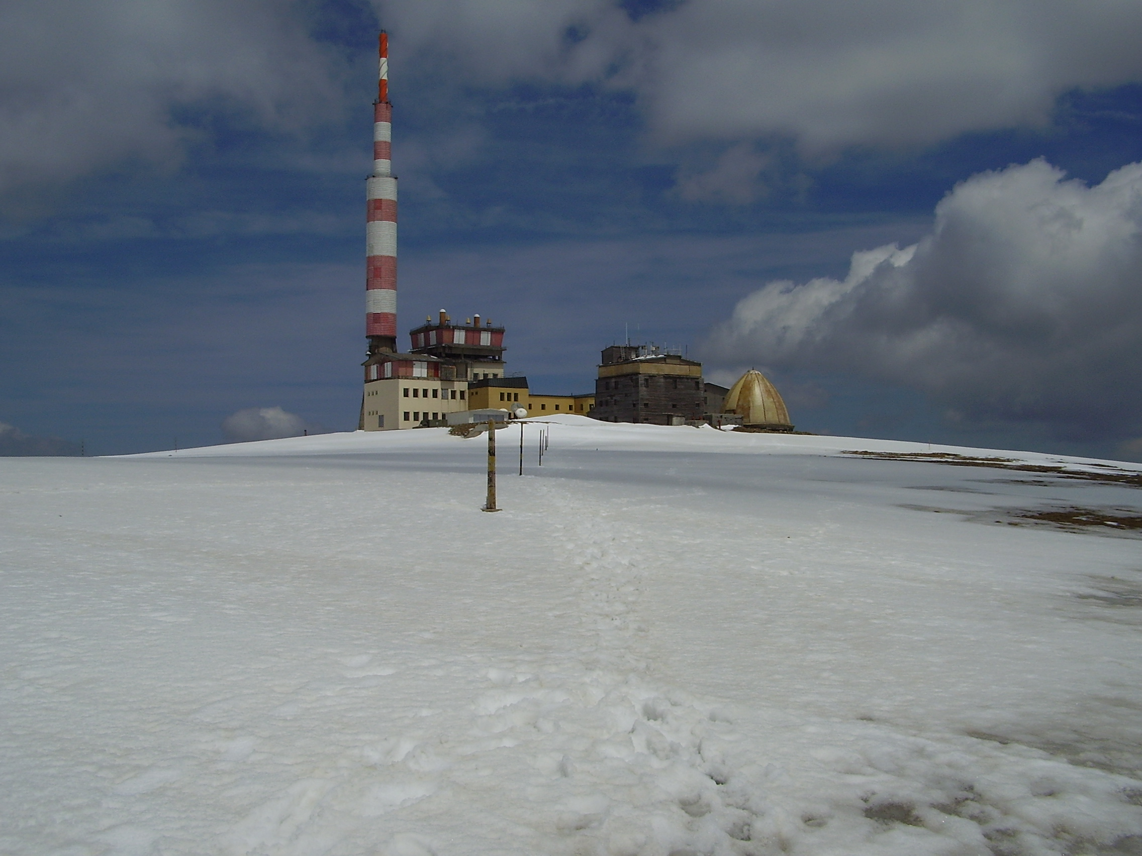 Botev peak in Balkan Mountains